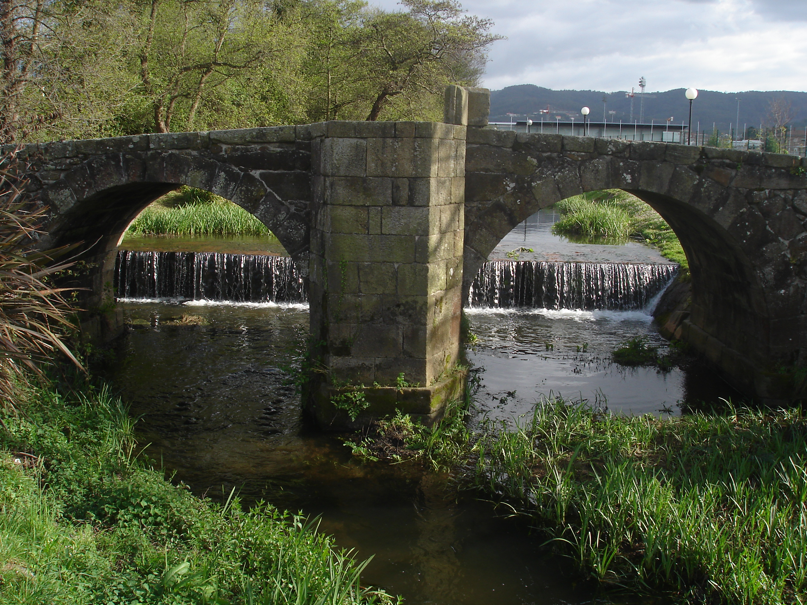 A Ponte dos Brozos sobre o río Arteixo, no concello de Arteixo. Esta ponte é unha das imaxes máis empregadas como símbolo do concello.